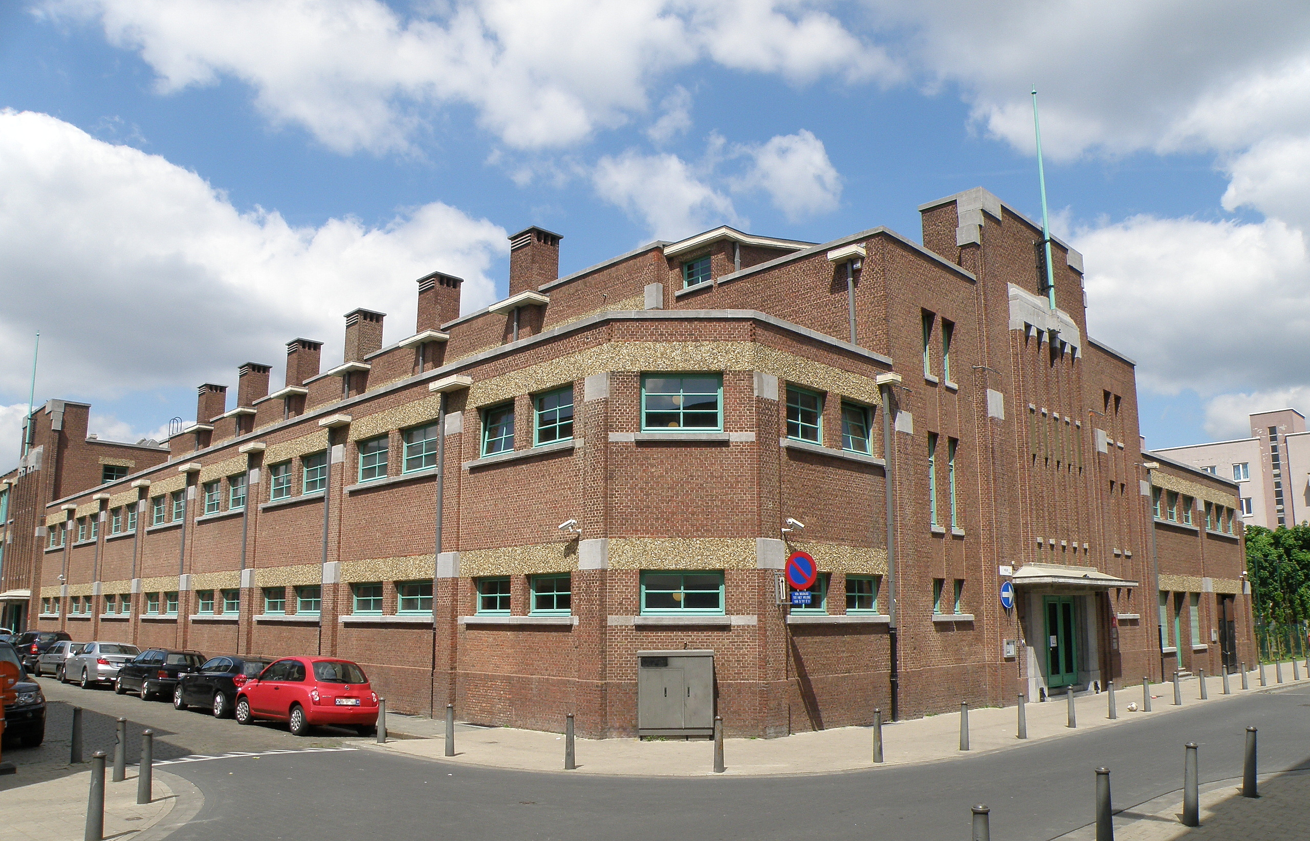 Antwerpen, België. Stedelijk zwembad, thans (na renovatie) genaamd Sportoase, gelegen aan de Veldstraat in de wijk Stuivenberg, anno 1926 gebouwd in Art deco-stijl n.o.v. Jan van Asperen, Emiel van Averbeke en Joseph Algoet. Gevels aan Alfons Engelsstraat (links) en Veldstraat (rechts).